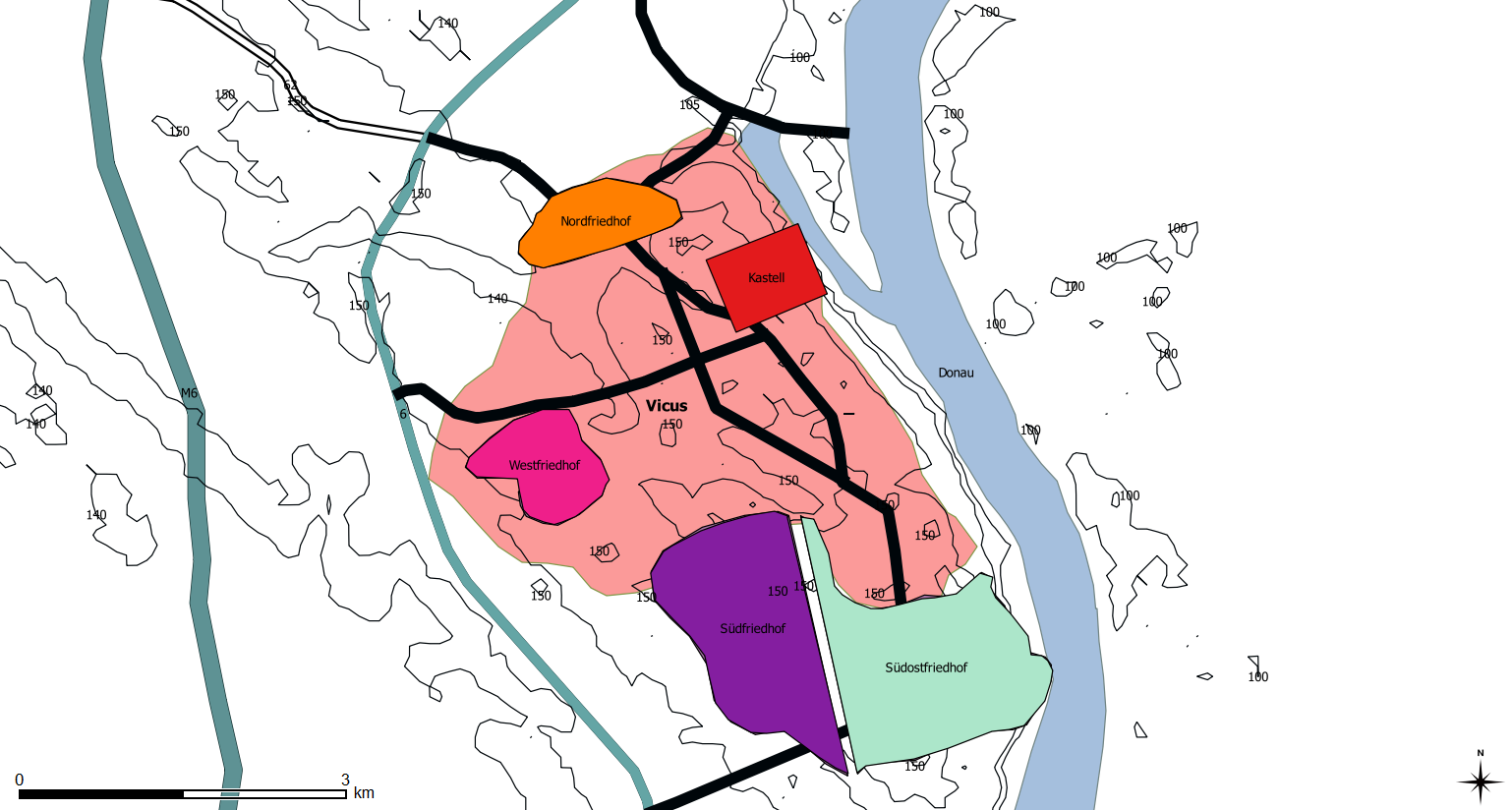 Ungefähre Lage des Kastells,des Vicus und der Gräberfelder von Intercisa im Gebiet der heutigen Stadt Dunaújváros.Nach Felix Teichner, 2011.